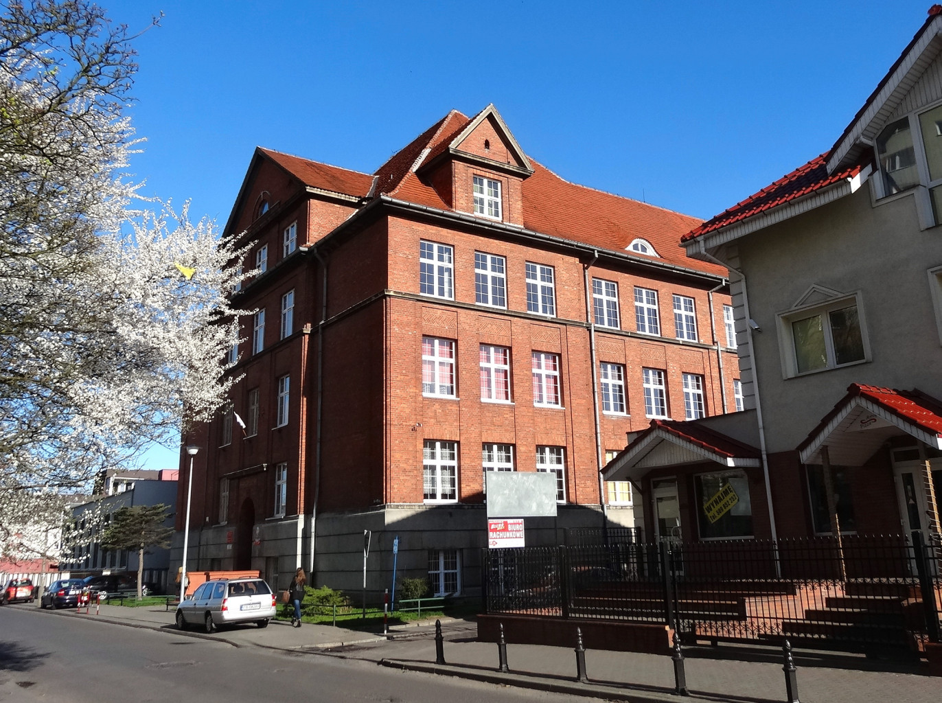 Budynek II LO w Bydgoszczy